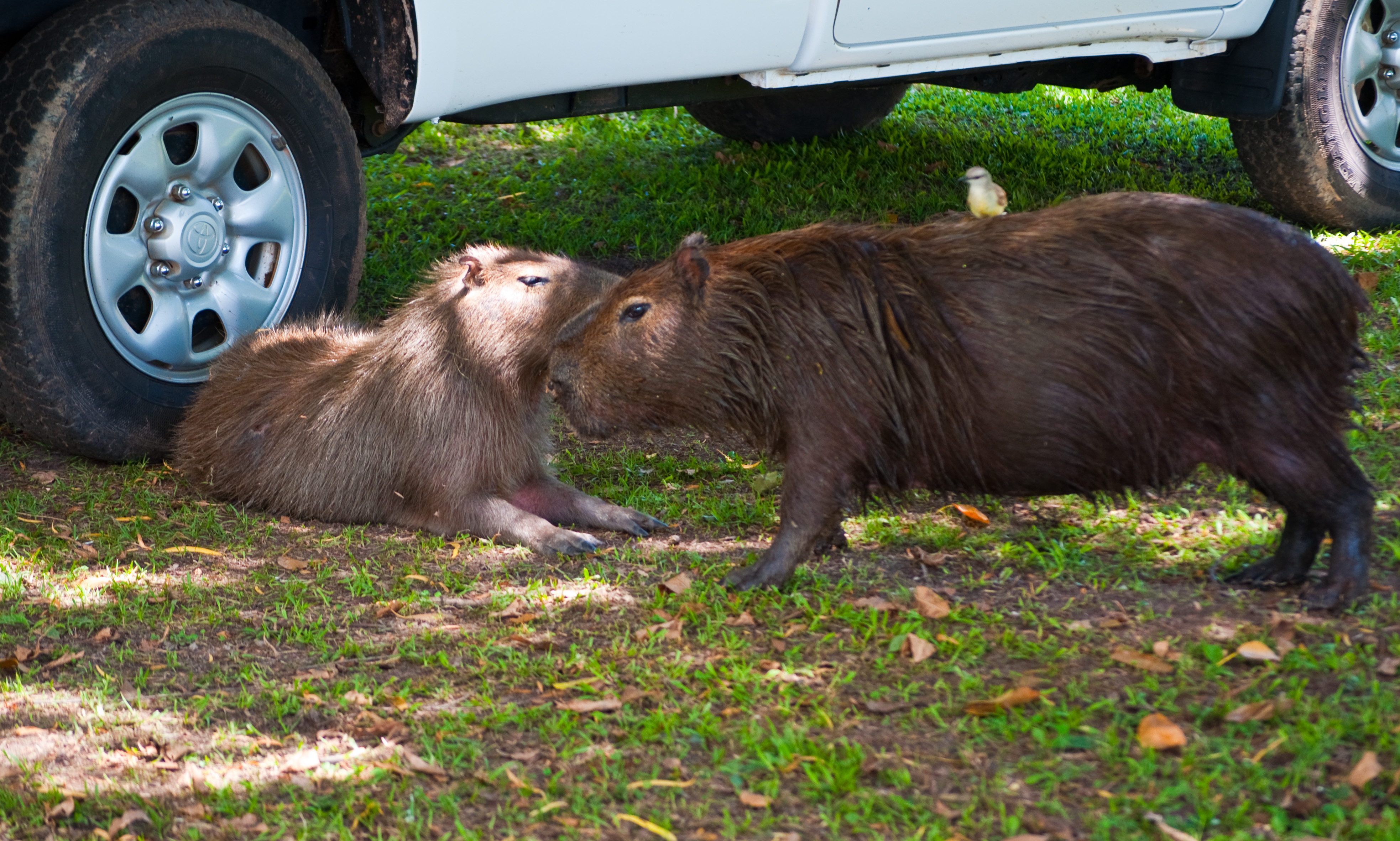 Capybara affection, Esteros Del Ibera, Corrientes, Argentina, 2nd. Jan. 2011